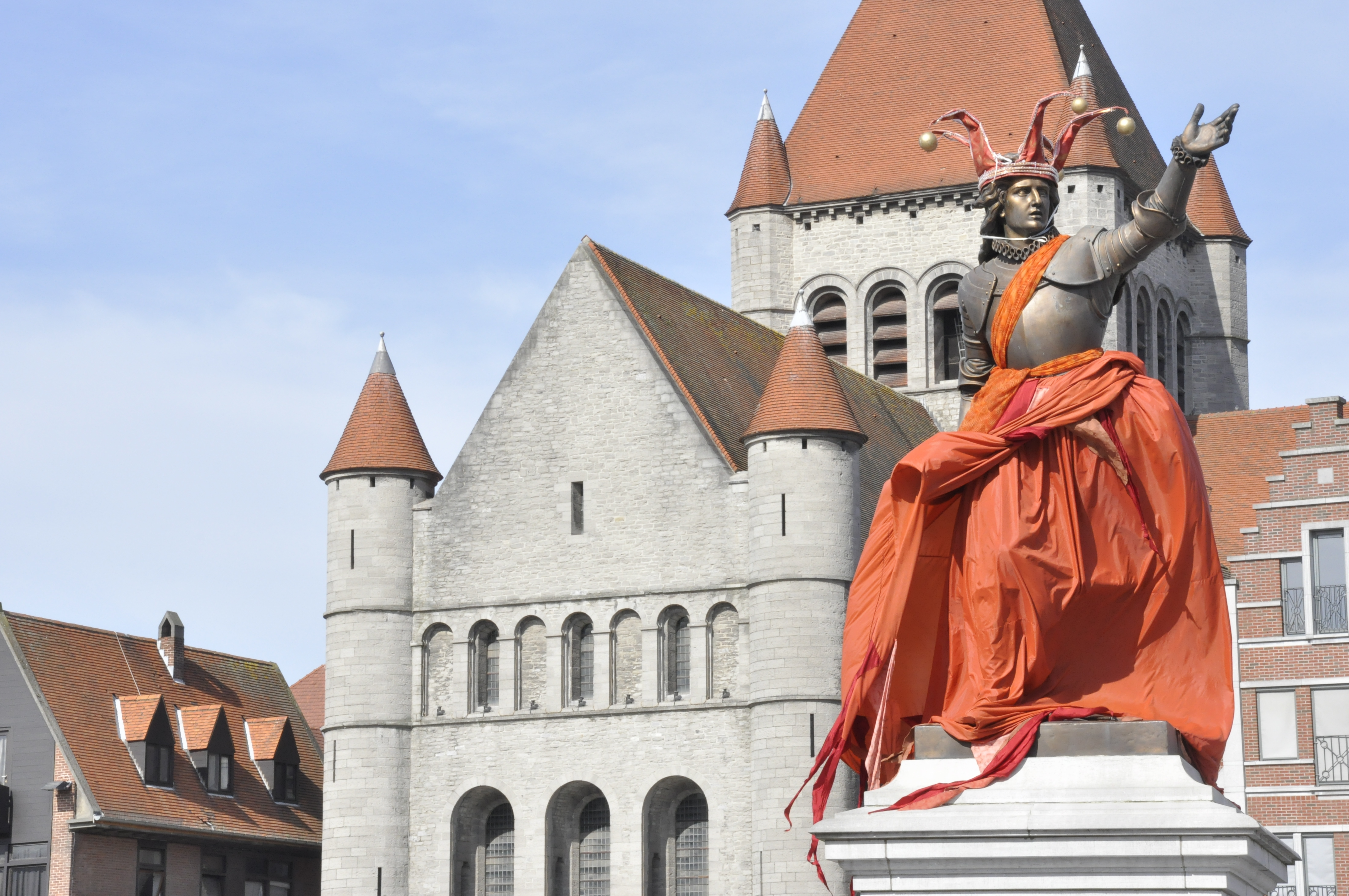 Sur la Grand Place de Tournai, le 2 avril 2011 lors du fameux Carnaval de Tournai, la statue de Christine de Lalaing, Princesse d'Espinoy avait revêtu son habit de fête. En arrière plan, l’Église Saint Quentin, massive et impressionnante, sur fond de ciel bleu.